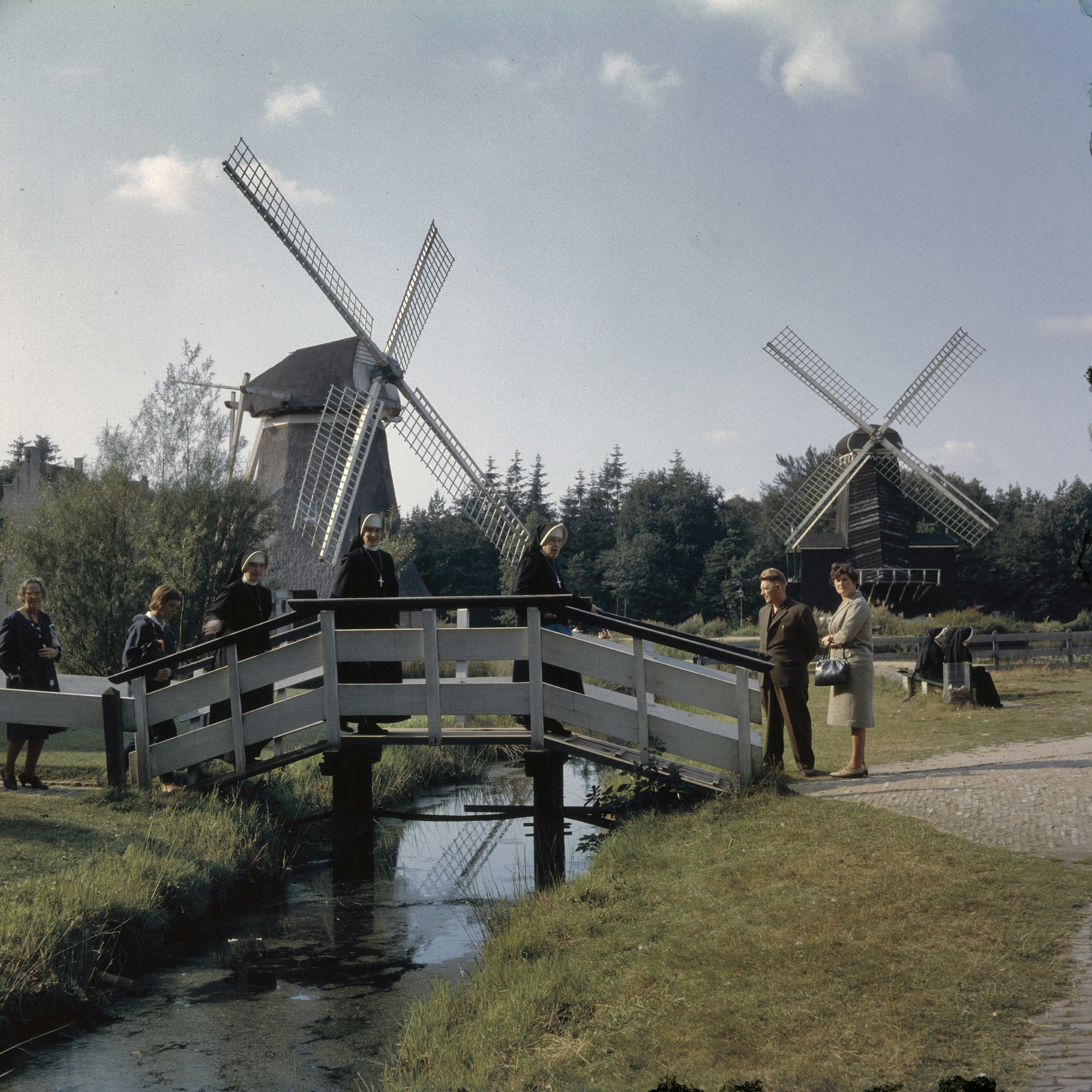 Openluchtmuseum/ Molen Noordlaarder Oostpolder: Overzicht, links een poldermolen uit Noordlaren ( Gr. ), 1960 geplaatst, rechts Mijn Genoegen / Het Spinnewiel uit Numansdorp, voorjaar 1928 geplaatst (opmerking: Van deze molen is ook een Sipman-tekening)